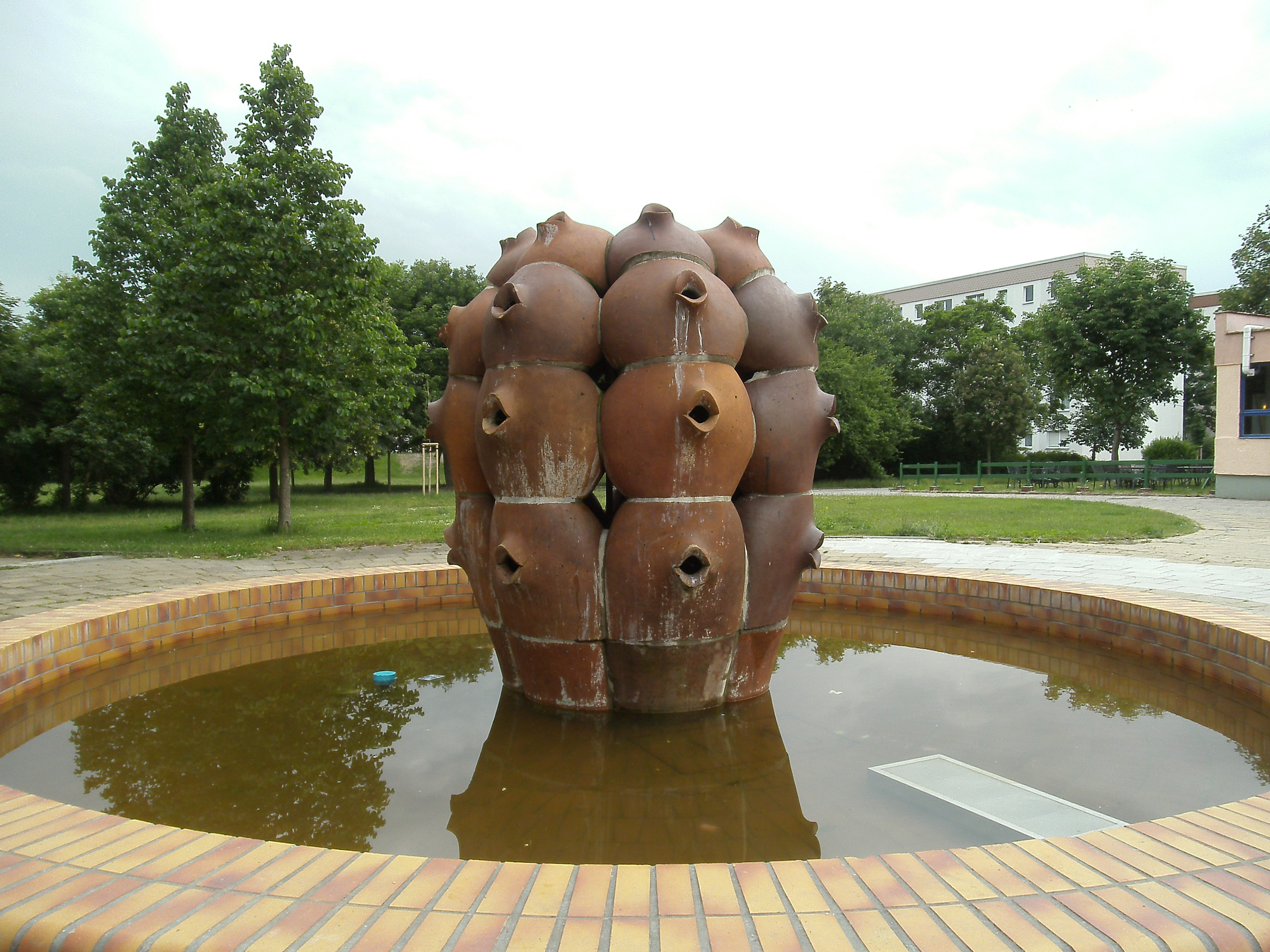 Peter Michael, Kaktusbrunnen, 1983, Klinker Carl-Schorlemmer-Ring